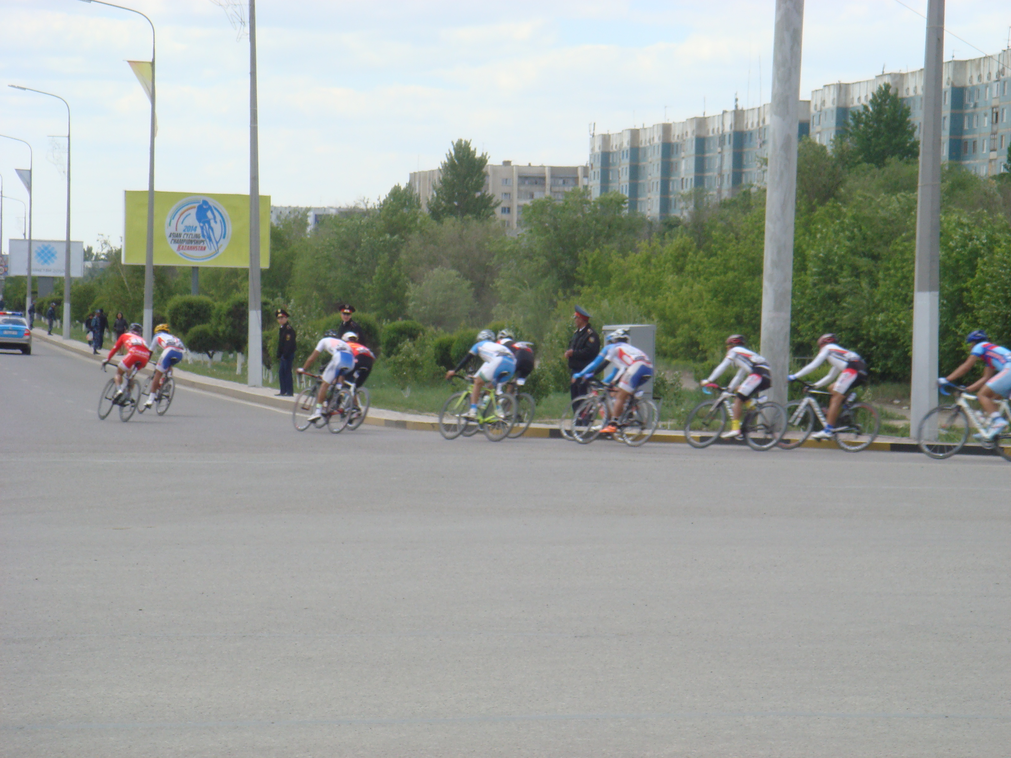 Чемпионат Азии по велоспорту 2014